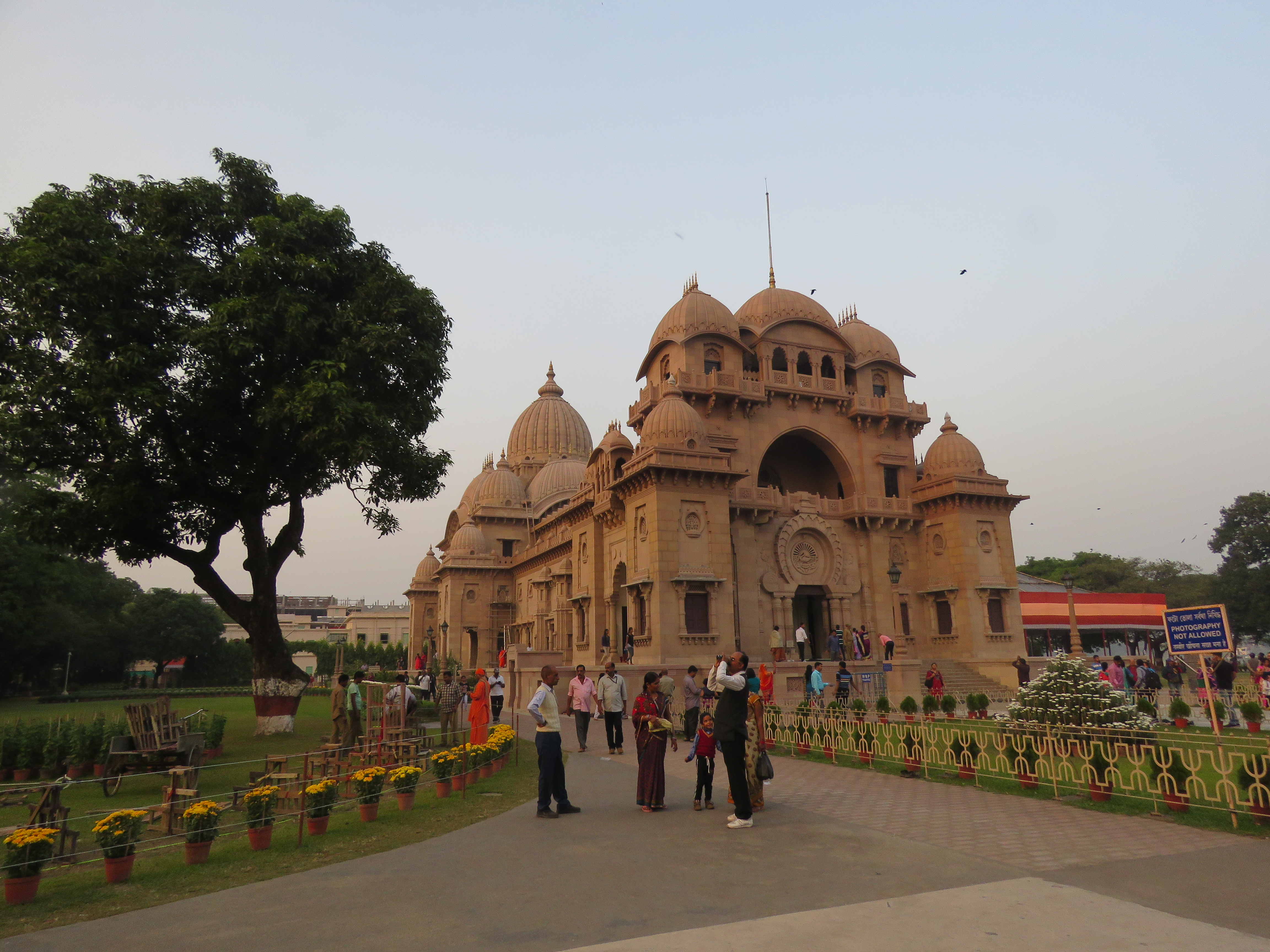 IRCTC 2017 - by Vinayaraj